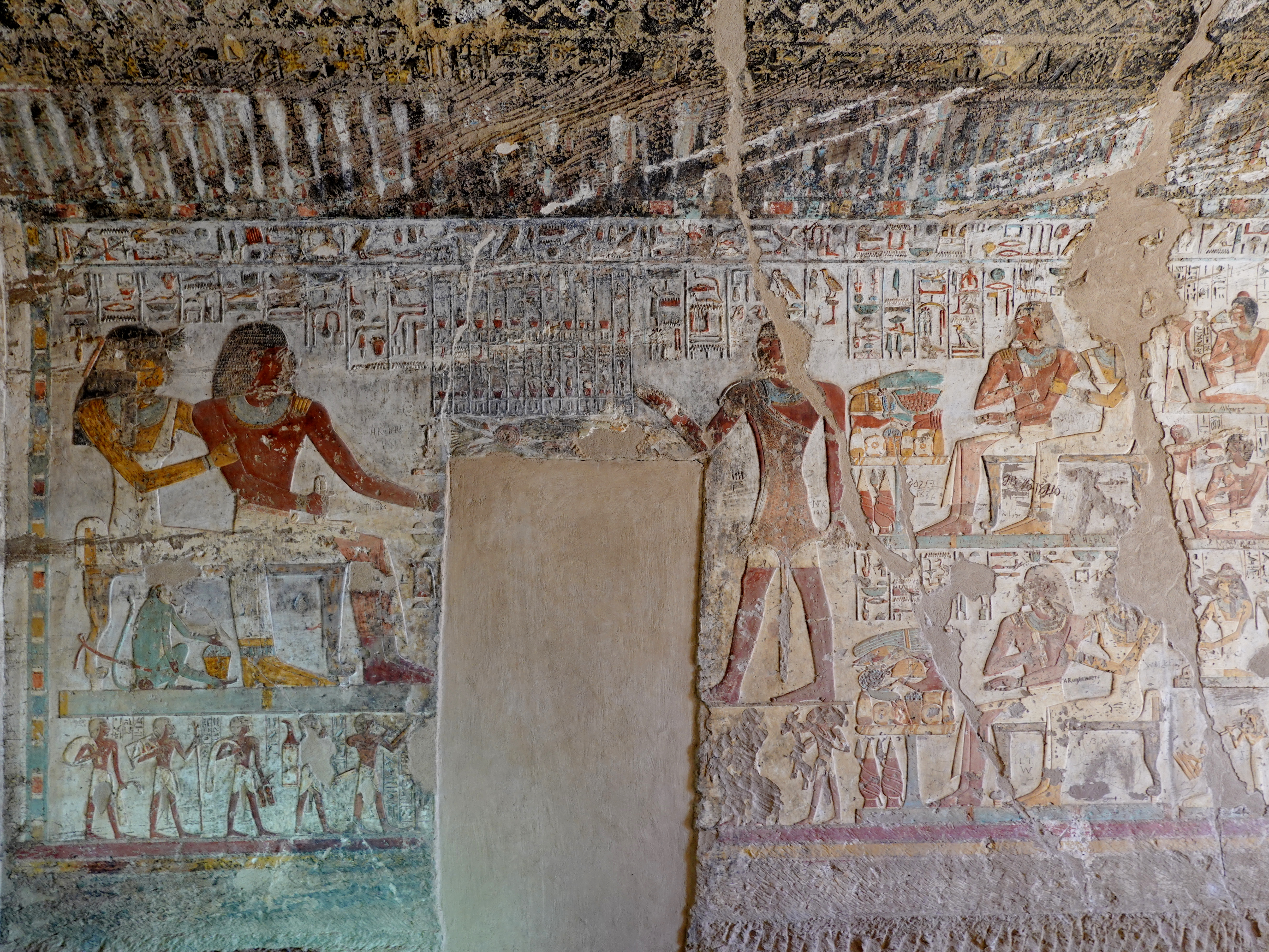 Felsengrab des Paheri unter den Felsengräbern des altägyptischen Necheb bei el-Kab, Ägypten